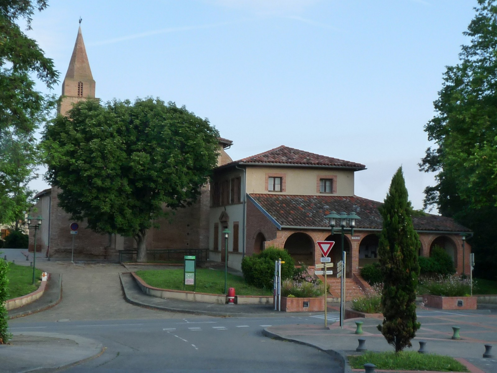 Centre du vieux bourg, Auzielle, Haute-Garonne, France